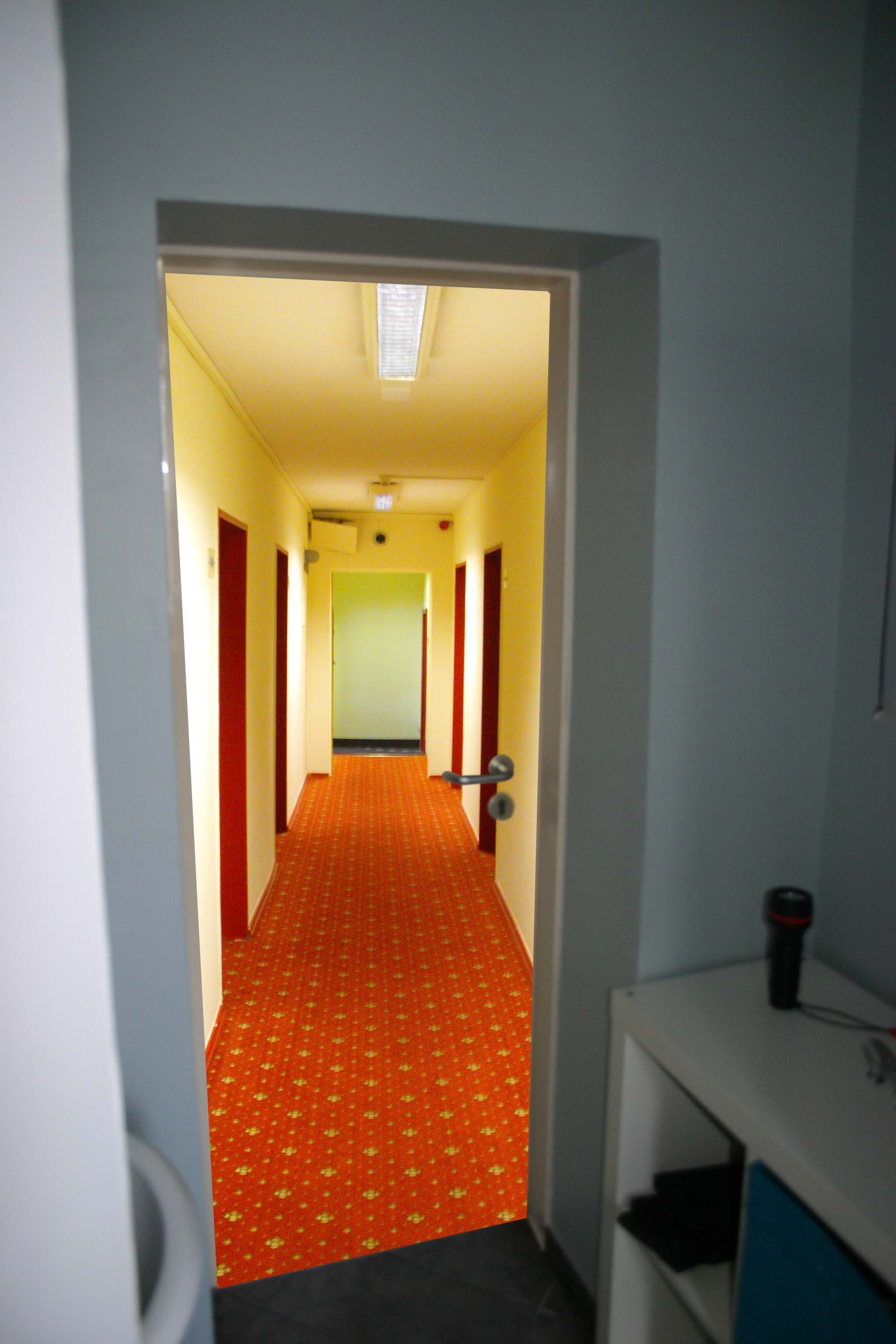 Tür mit Türtapete, lässt den Raum größer wirken.